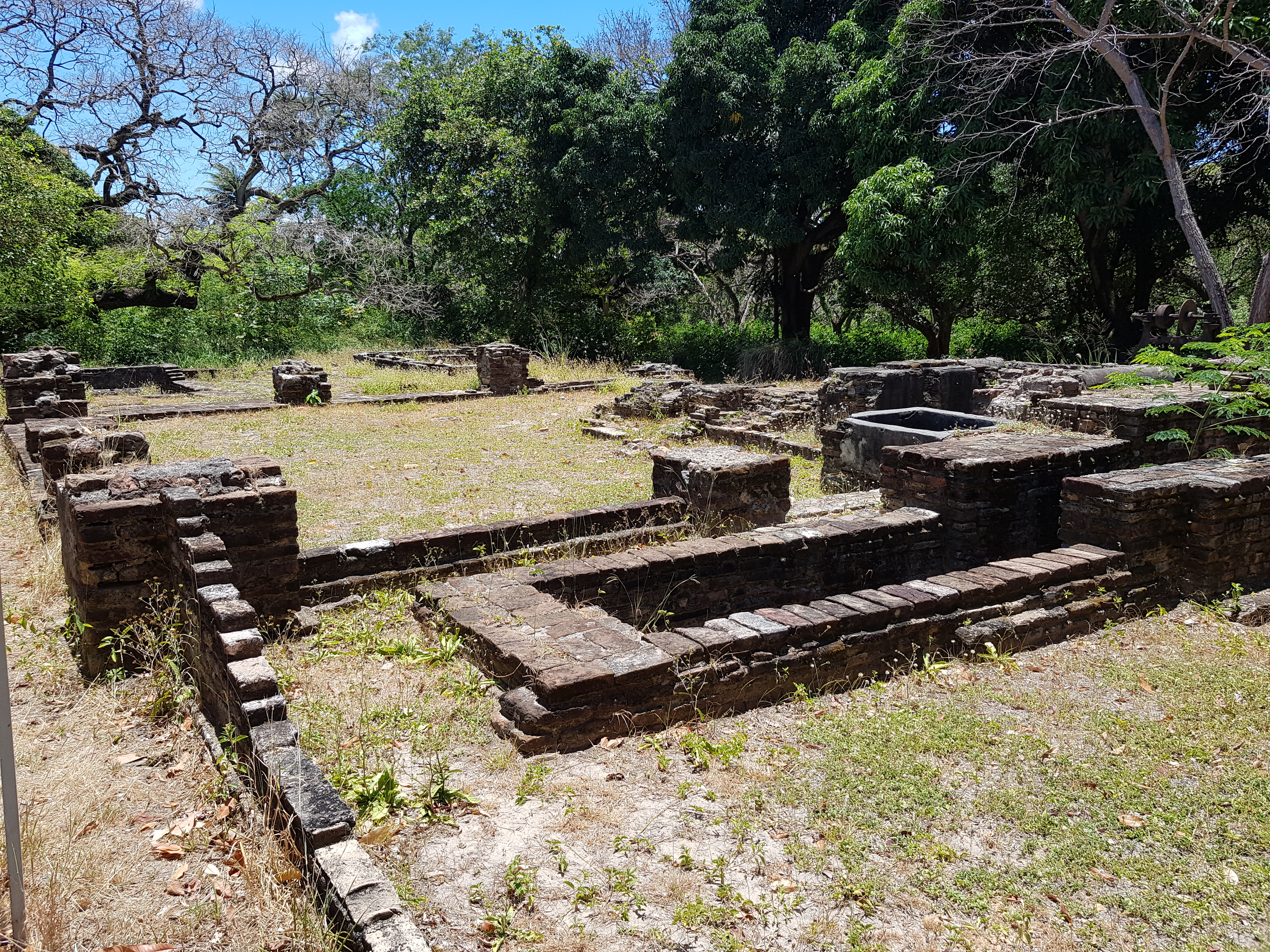 Ruínas do primeiro engenho do Ceará, localizado no antigo Sítio Alagadiço Novo, ao lado da casa onde nasceu o escritor cearense José de Alencar.